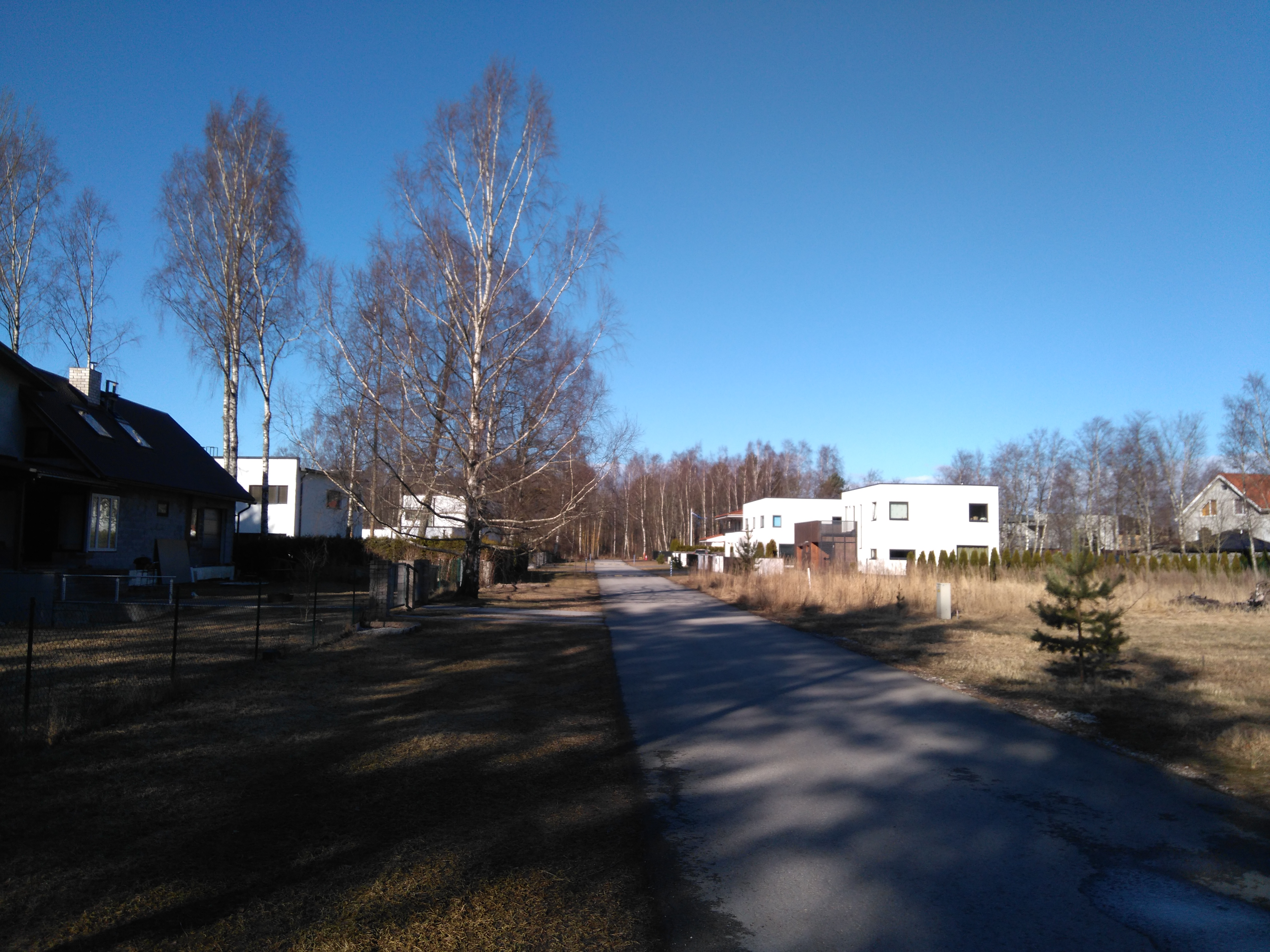 Kaladi tänav